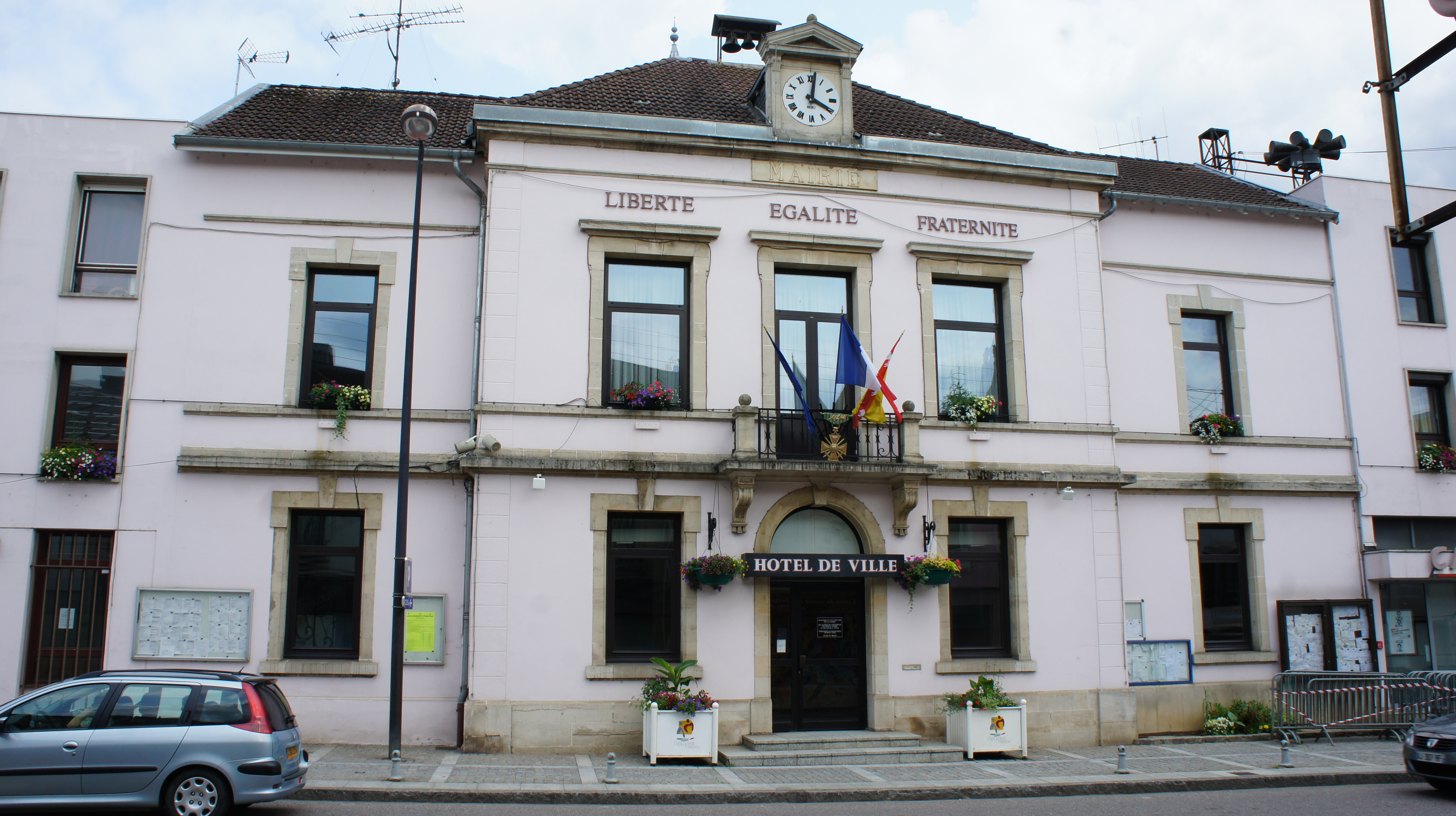 La Marie à Neuves-Maisons.